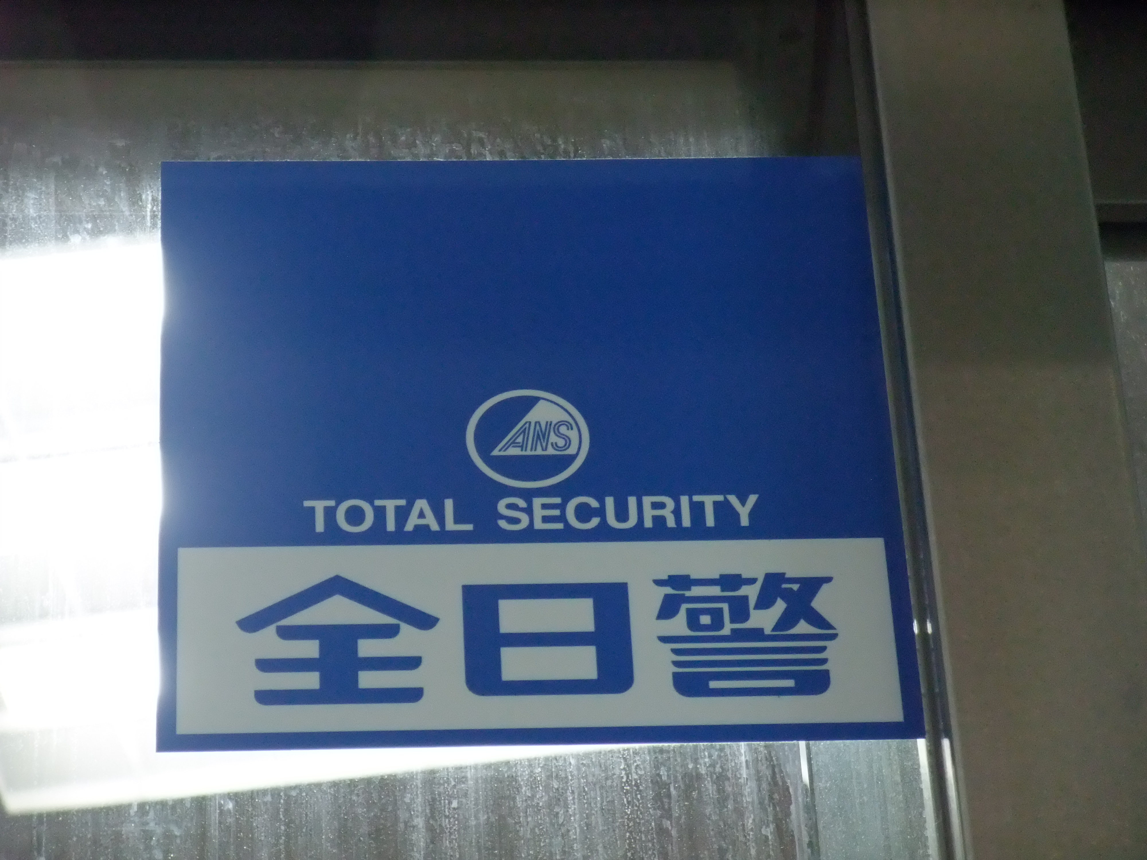 全日警警備対象に貼られているステッカー